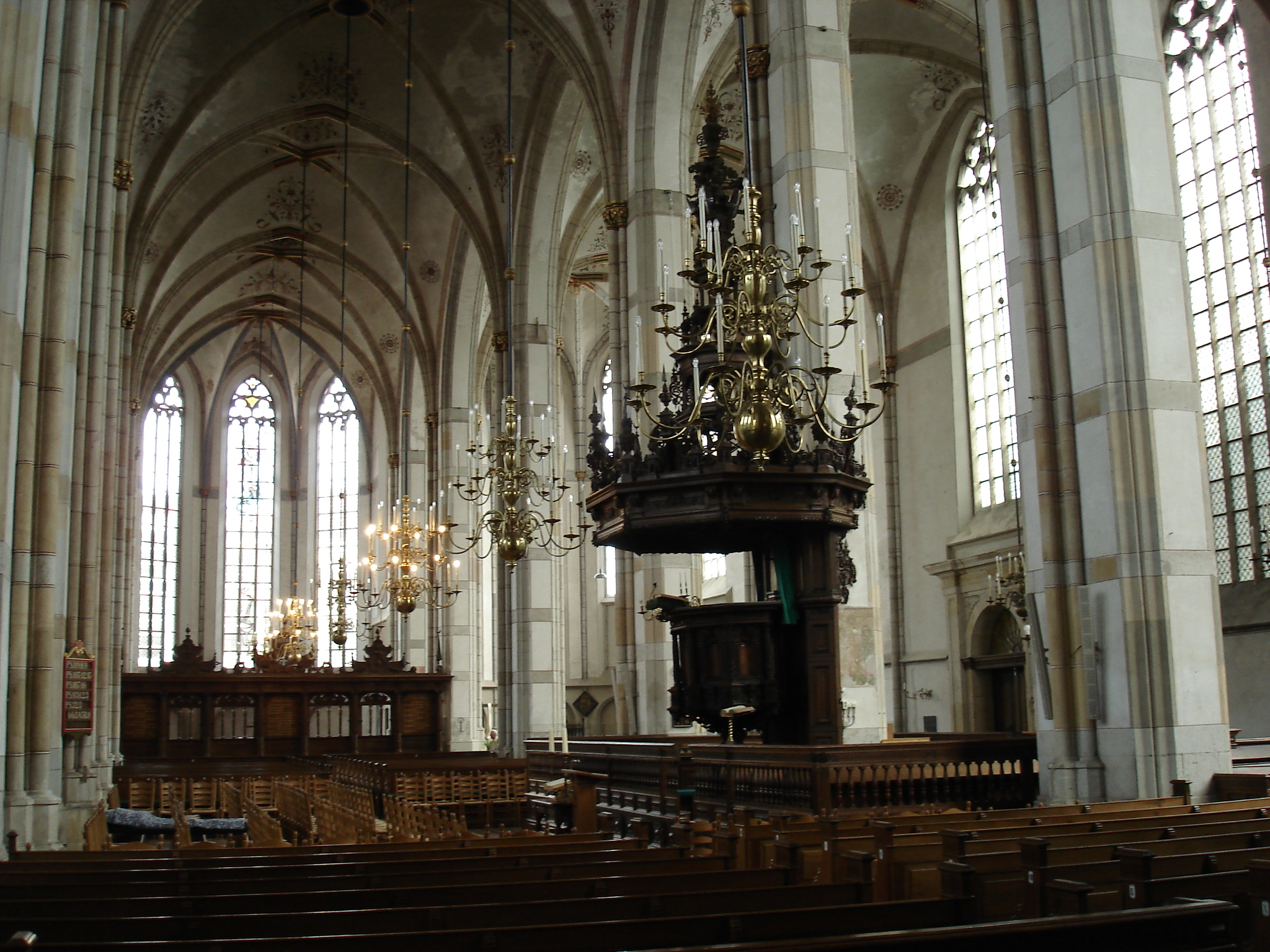 Het interieur van de Sint Michaëlskerk te Zwolle